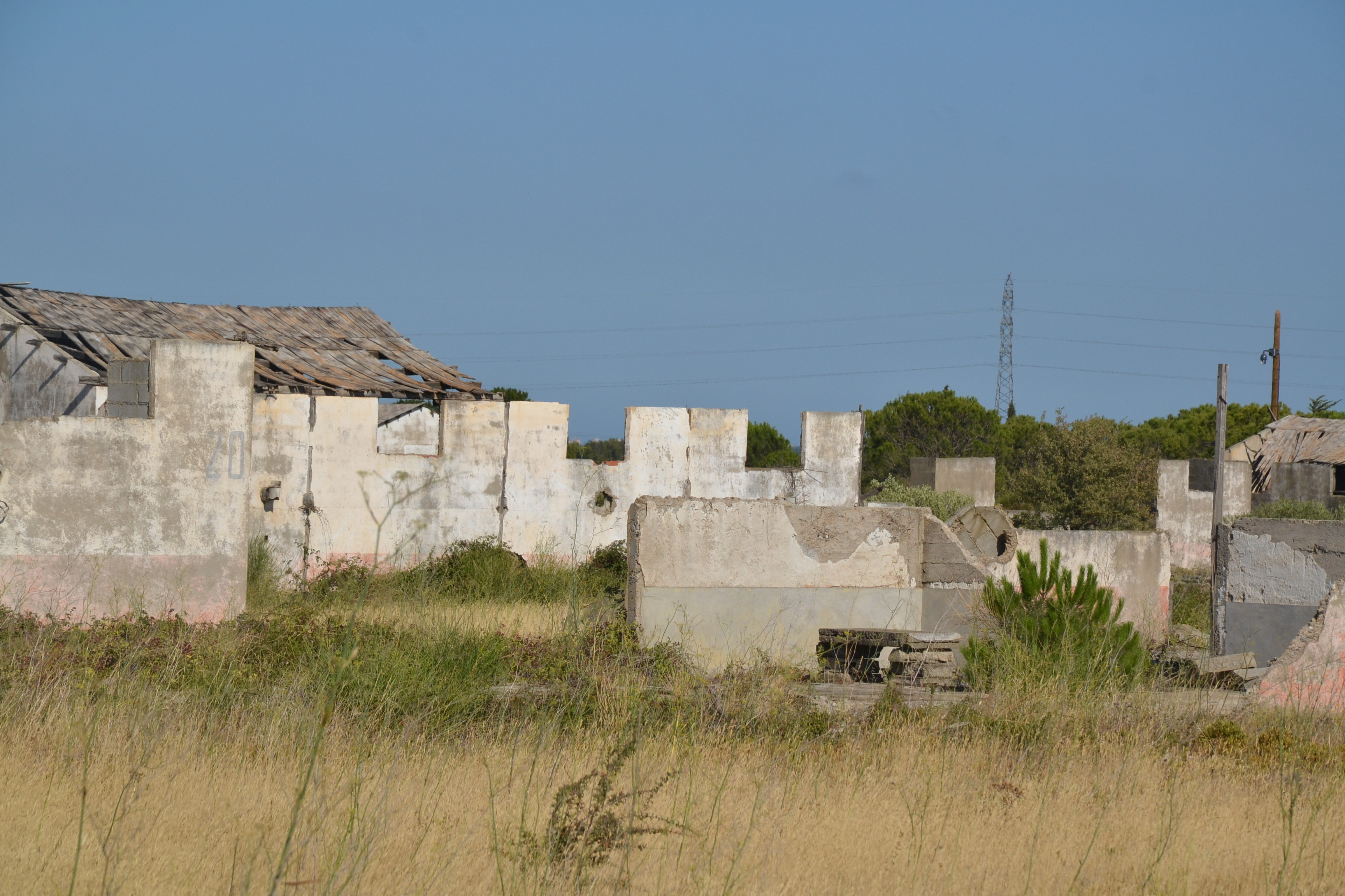 Camp de Rivesaltes (Pyrénées-Orientales, France).